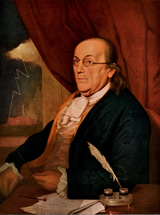 Portrait of Benjamin Franklin.